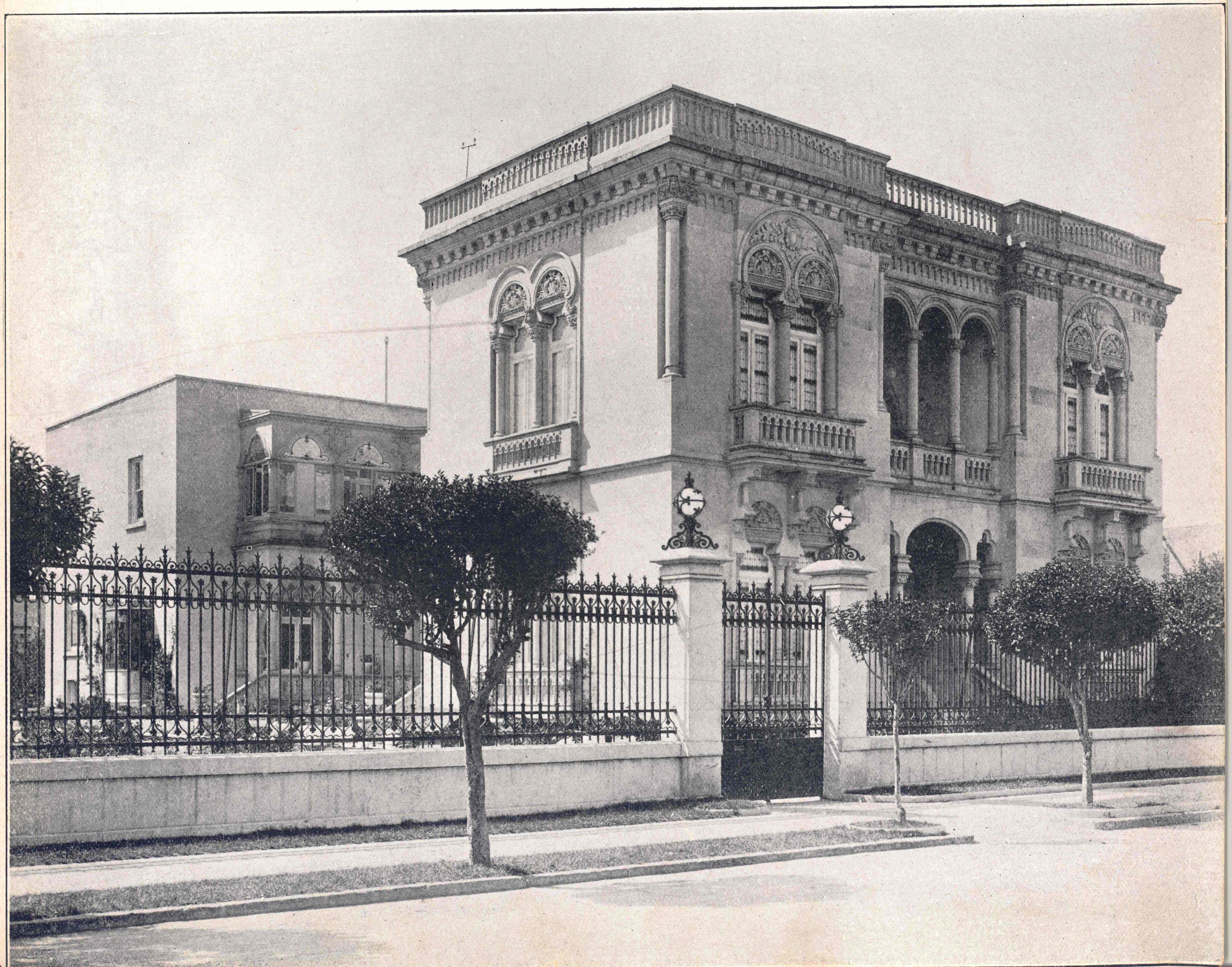 Zacatecas 120, colonia Roma, actual sede de la Universidad de la Comunicación.